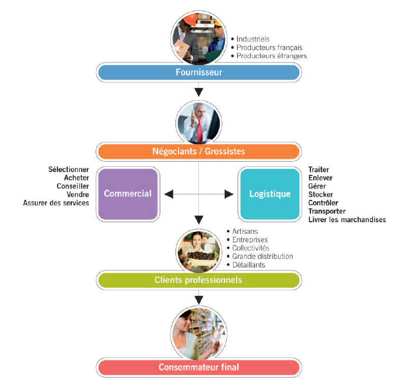 Ce schéma représente la place du commerce B to B dans la chaîne du commerce (du fournisseur vers le consommateur final)